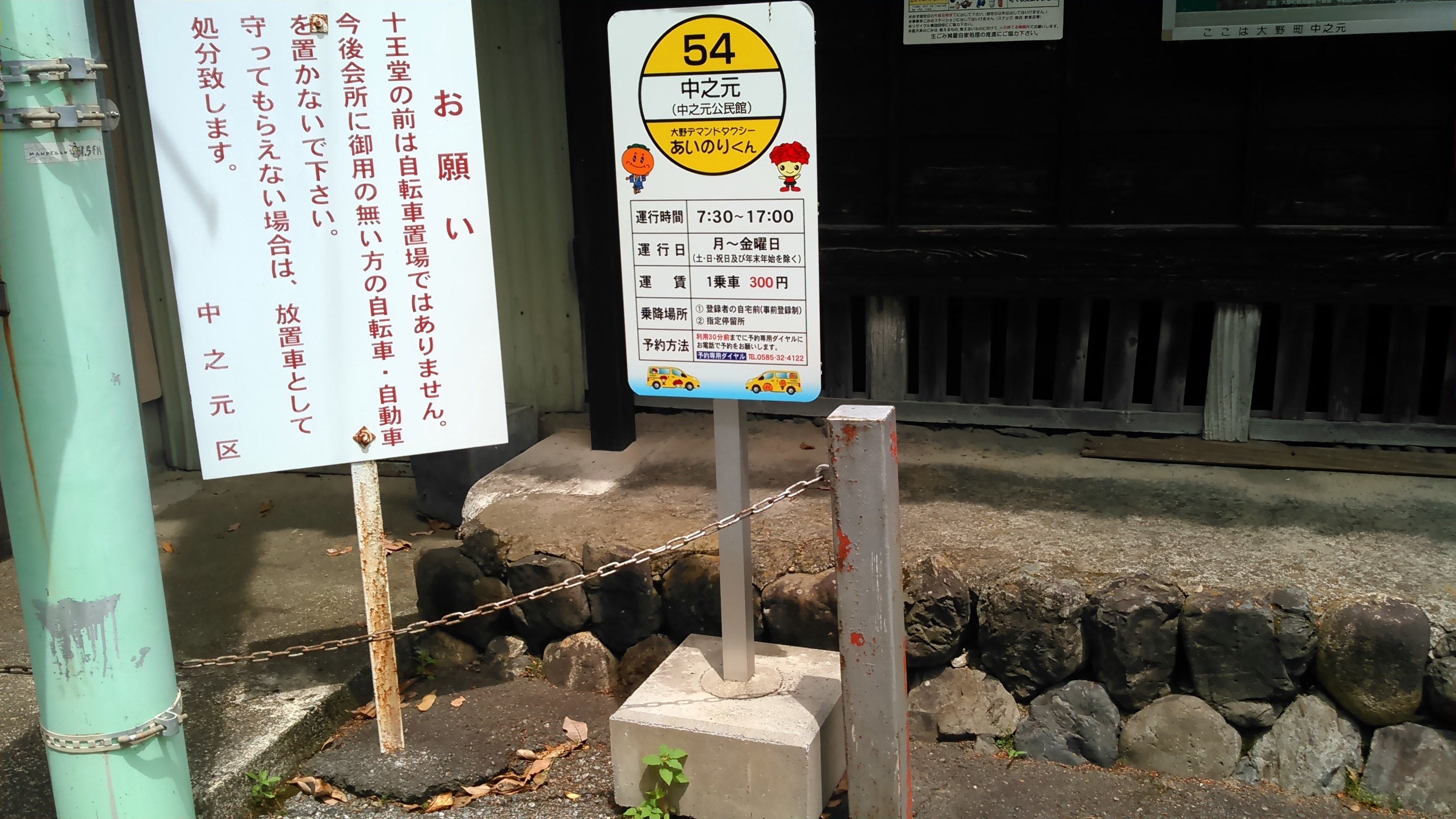 名鉄揖斐線廃線後の代替交通手段。 利用は大野町の認可が必要。